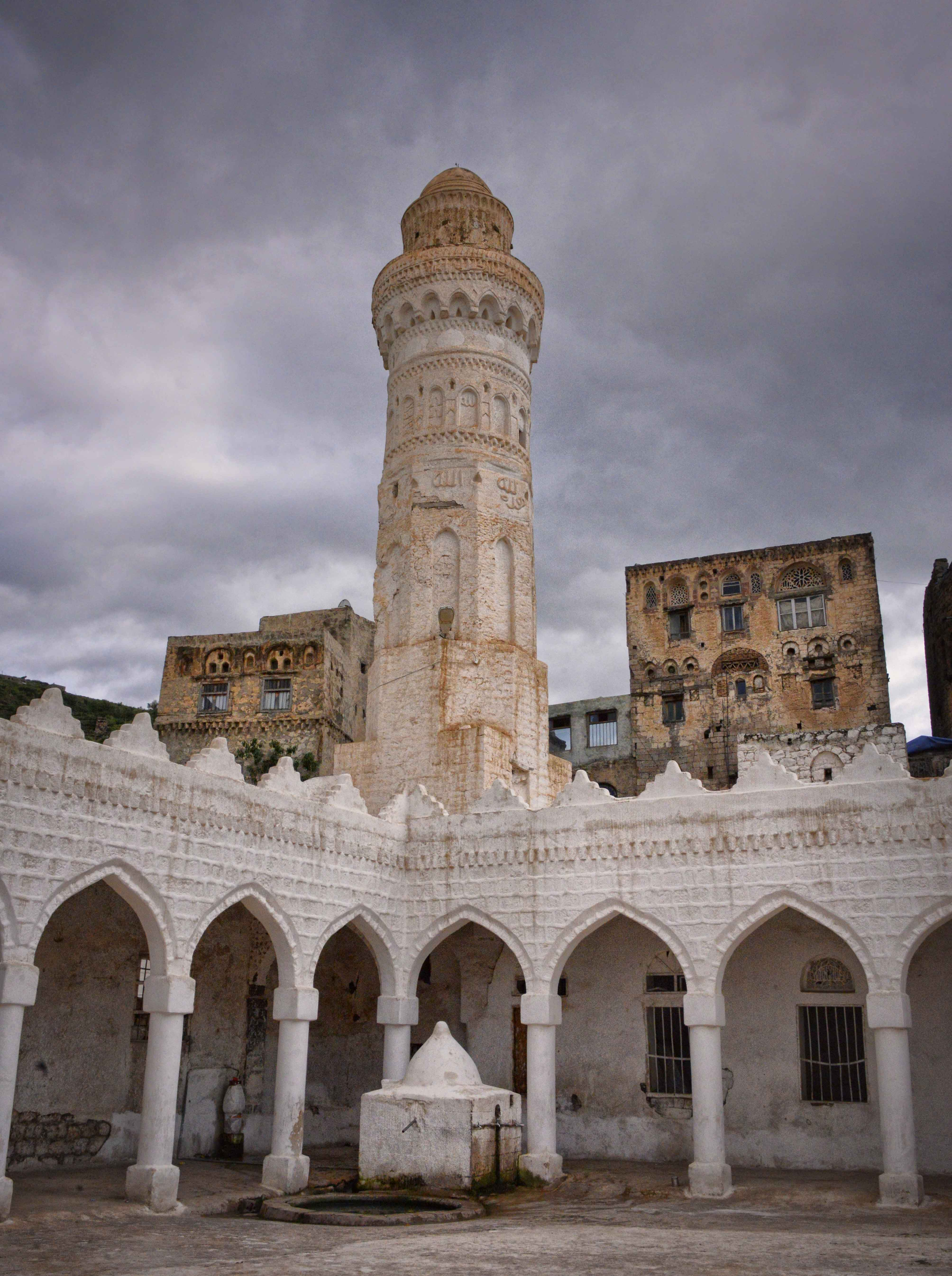 Mosque, Yemen